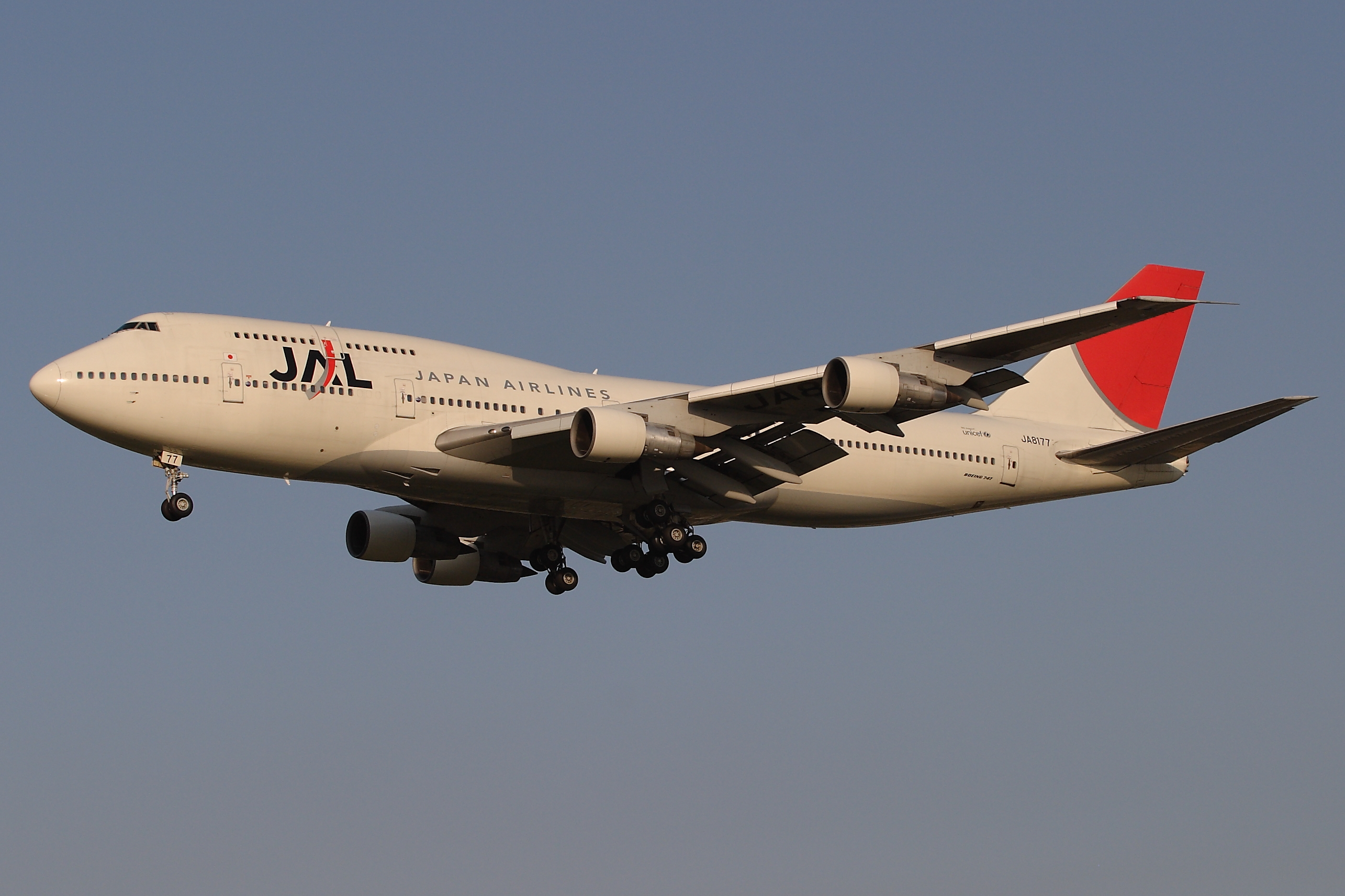 日本航空 ボーイング 747-346 JA8177 福岡空港